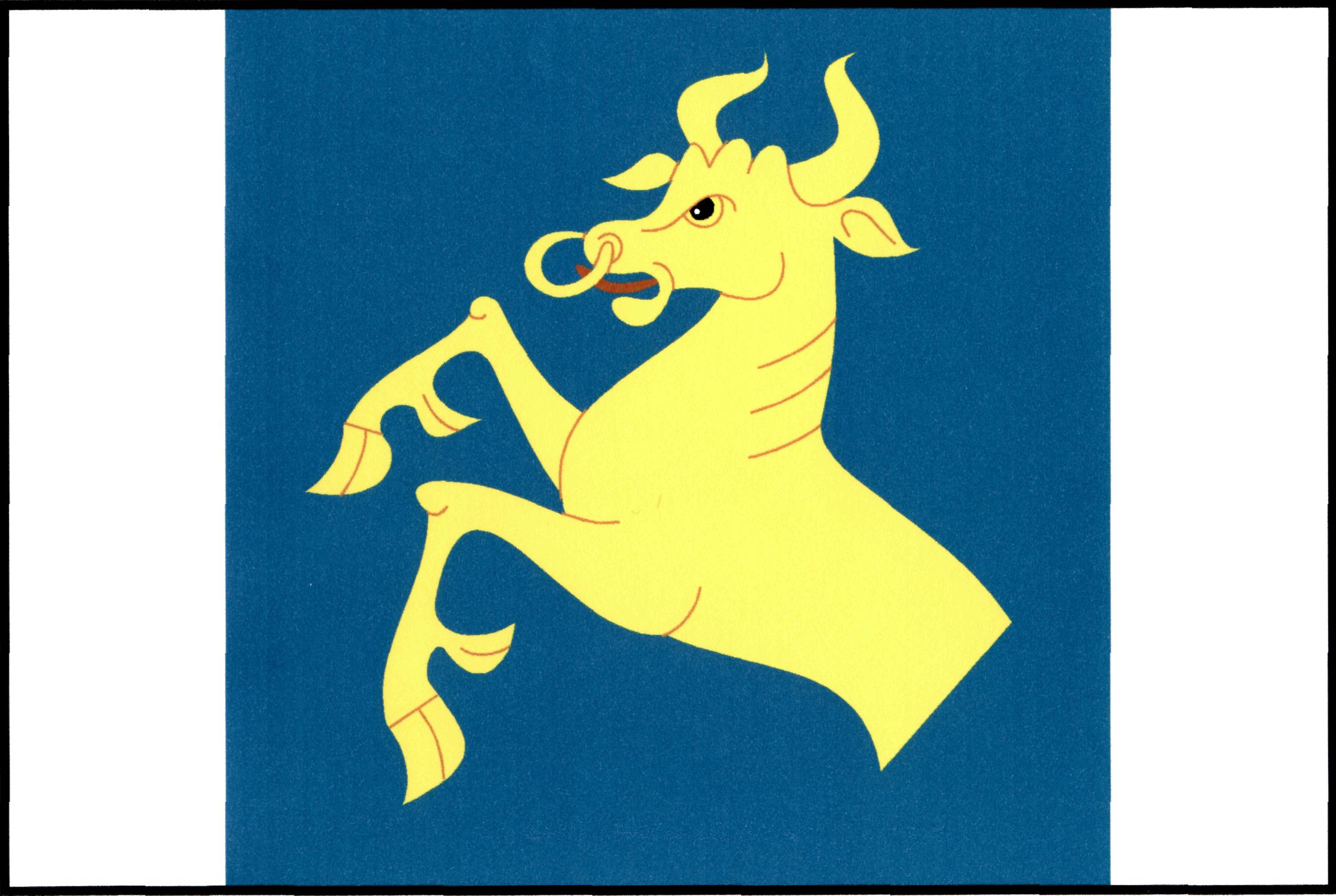 Vlajka obce Horní Bradlo